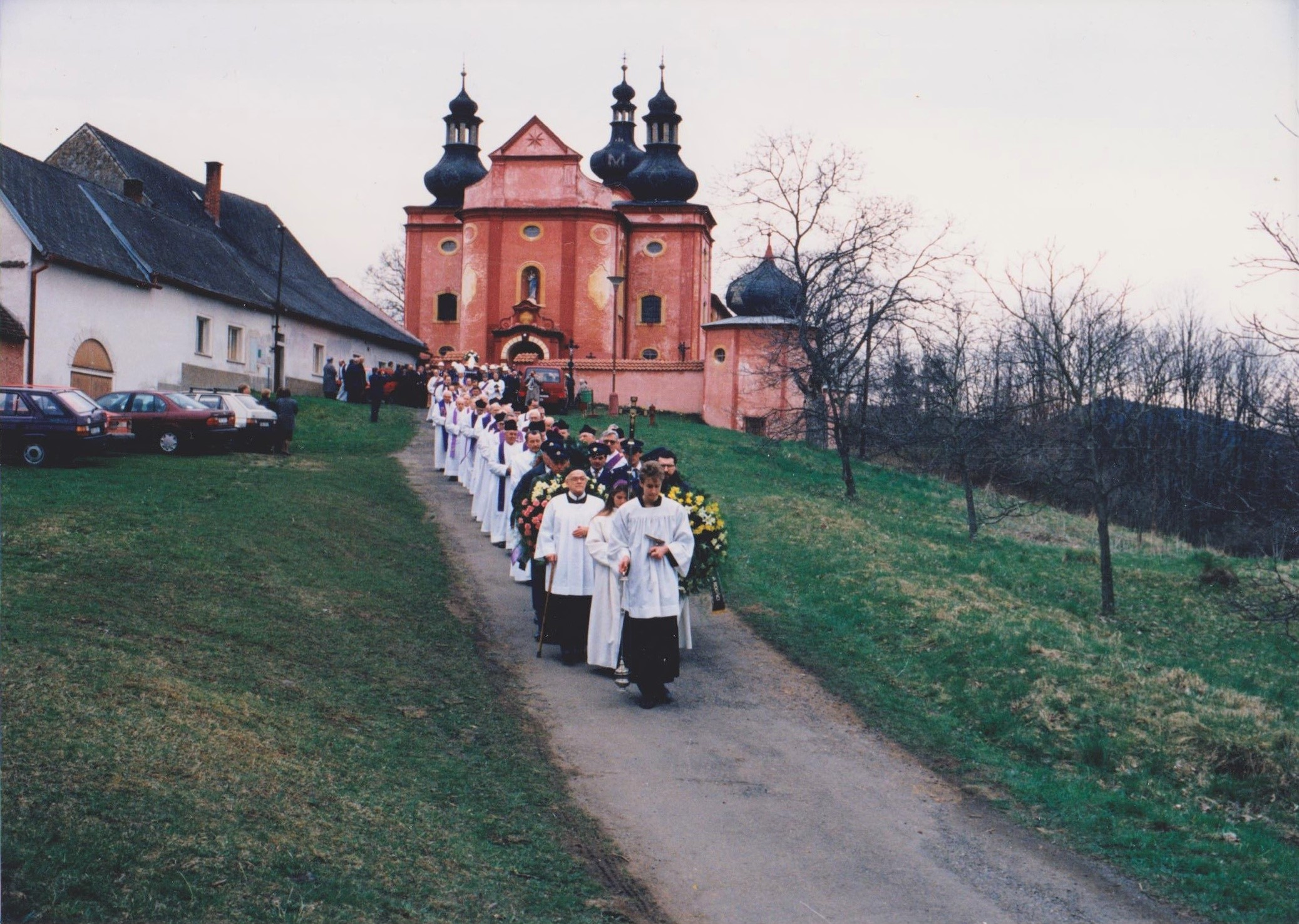 Pohřební průvod ze strašínské fary - František Daniel Merth (soukr. archiv)